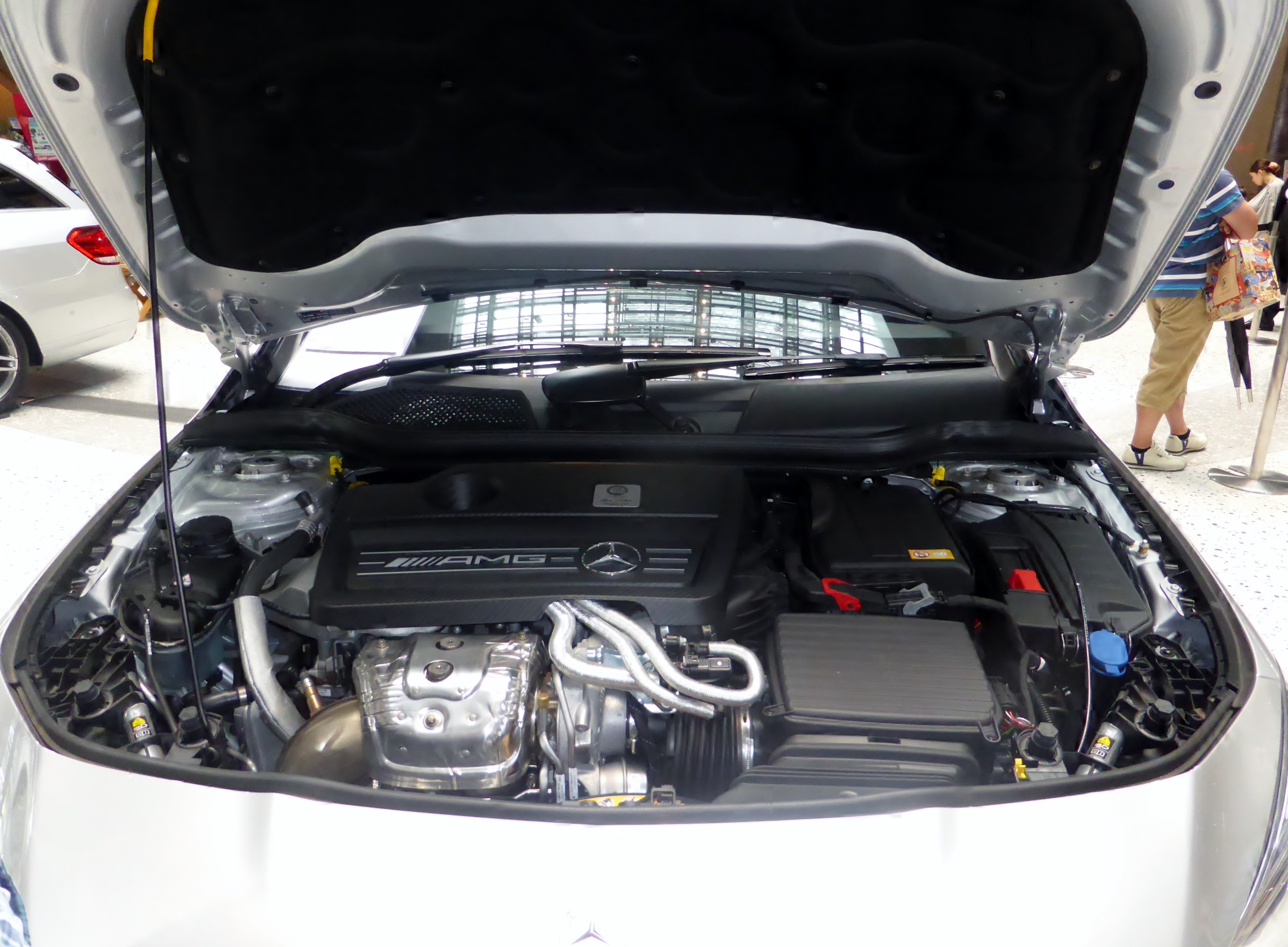 C117型メルセデス・ベンツCLA45AMG 4MATICのエンジンルームを撮影。